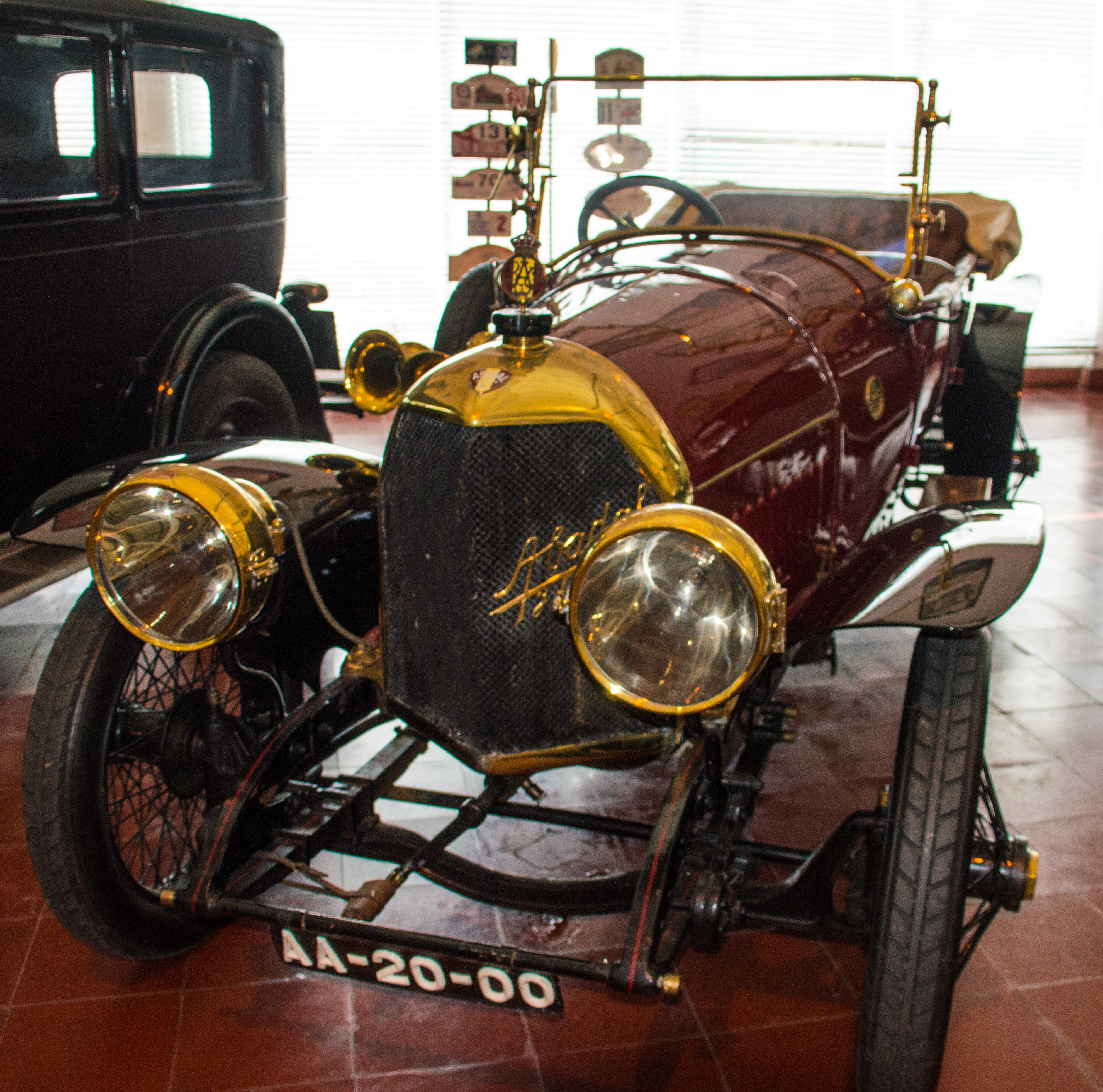 Abadal 25CV